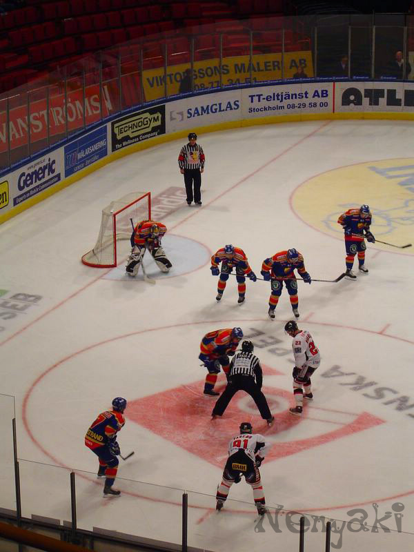 Swedish Elite League ice hockey game Djurgårdens IF vs. Malmo Redhwaks, at Globen, Stockholm